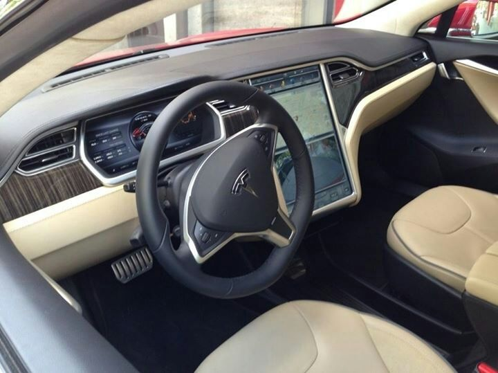 Что за авто